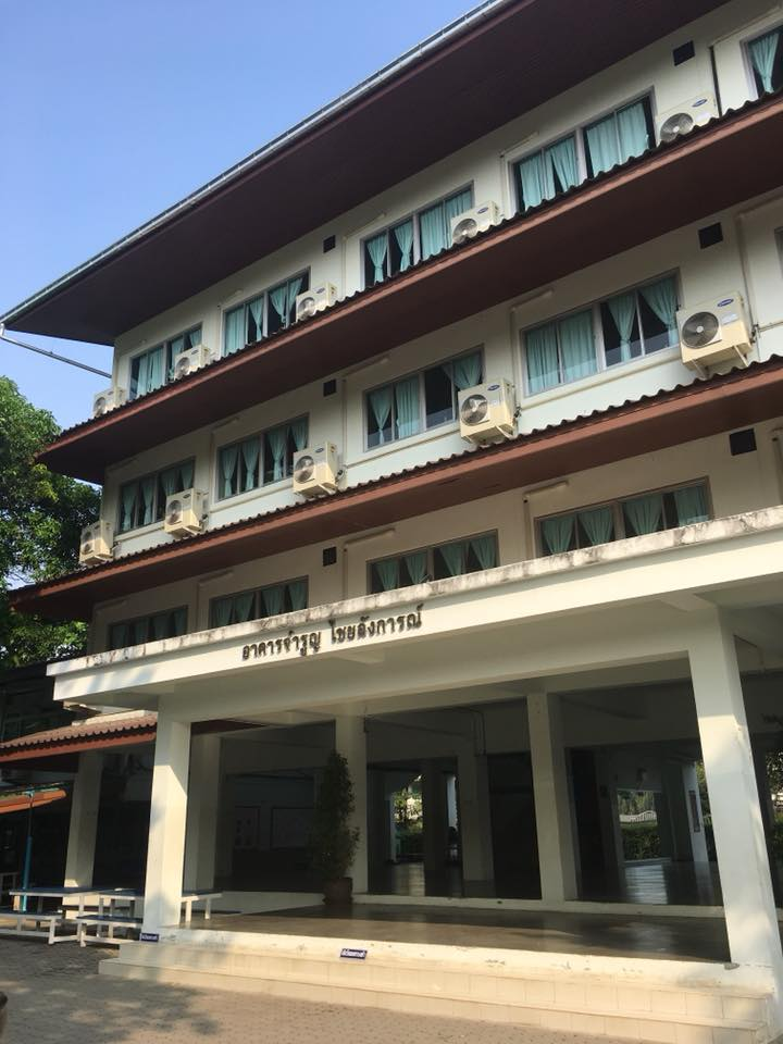 อาคารจำรูญ ไชยลังการณ์ โรงเรียนปรินส์รอยแยลส์วิทยาลัย